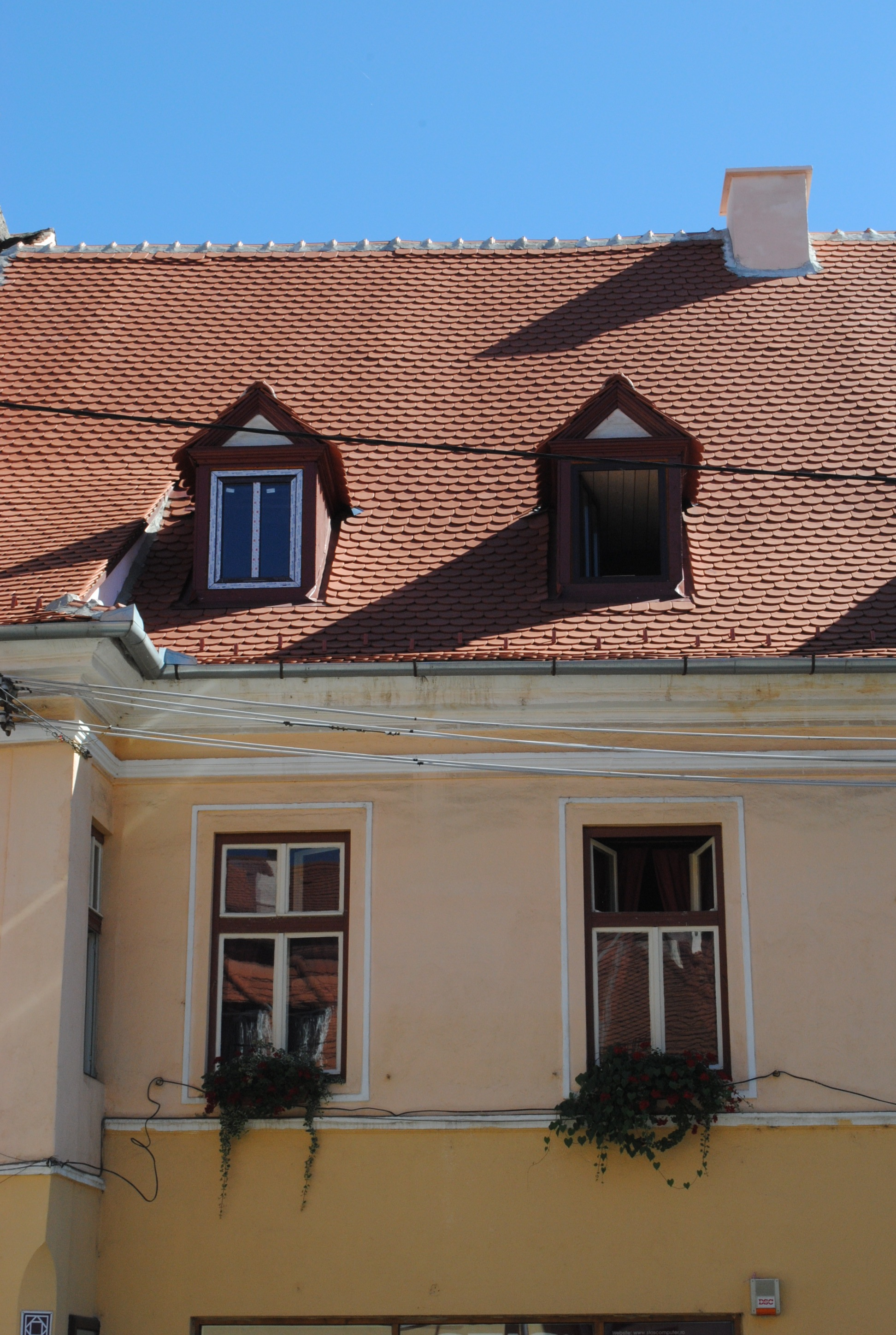 Casă, sec. XV - XVII, sec. XVIII, cca. 1885 - 1900